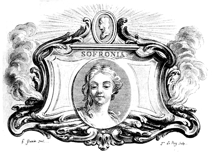 Immagine dal libro La Gerusalemme liberata, Agostino Delalain, Pietro Durand, Gio. Claudio Molini, Parigi, 1771